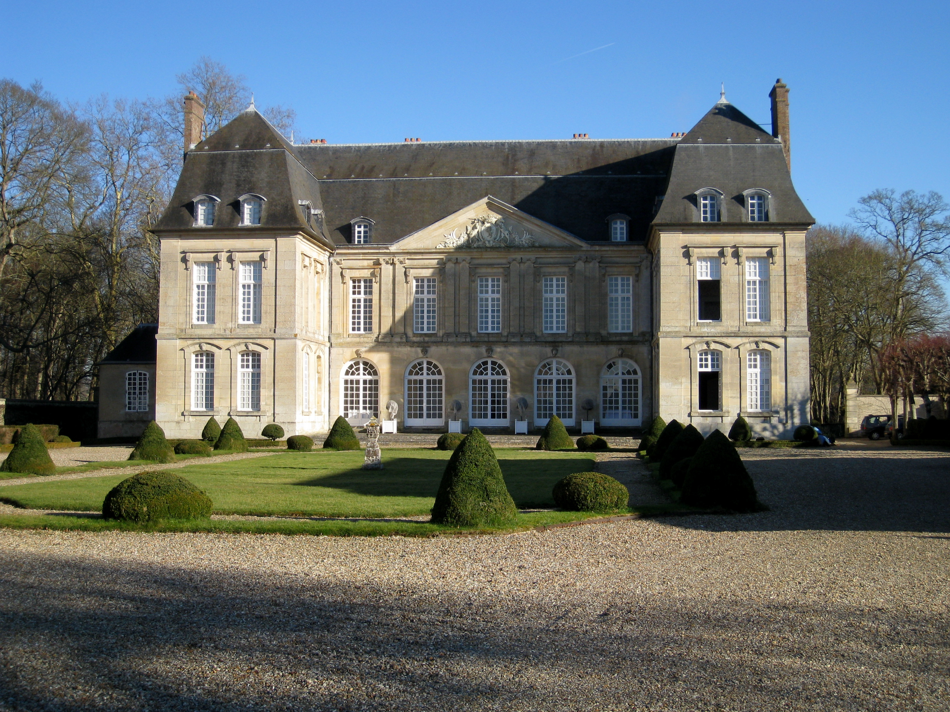 Chateau de Boury en Vexin, Oise, France